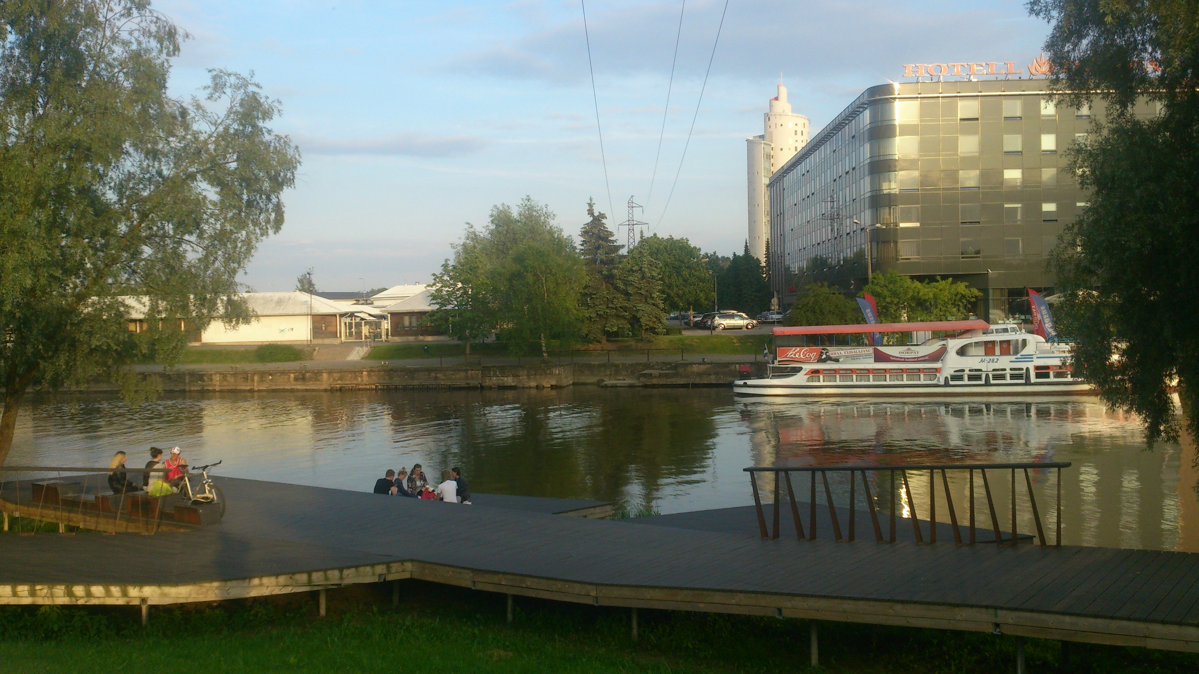 Elu Tartus Emajõe ääres, juuni 2015